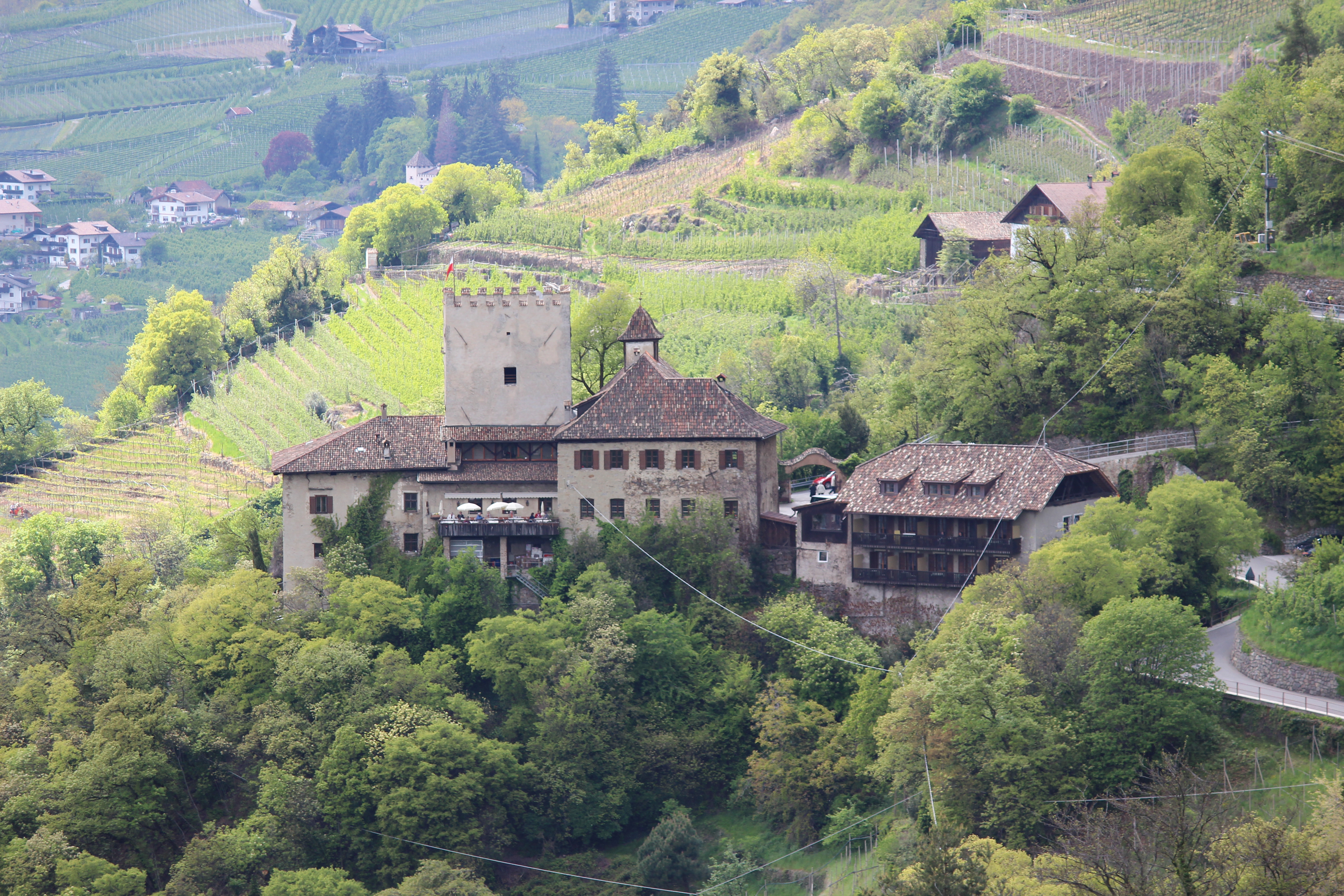 Turnstein (Thurnstein) in Dorf Tirol